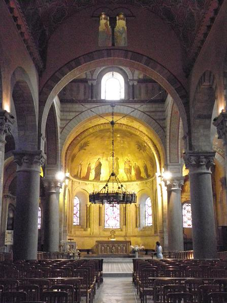 Vue intérieure de l'abbatiale St-Martin d'Ainay à Lyon (69). Vue de la nef vers le transept délimité par 4 arcs diaphragmes, puis le choeur. Les arcs-diaphragmes soutiennent une coupole octogonale. Description de la coupole de St Martin d'Ainay p505